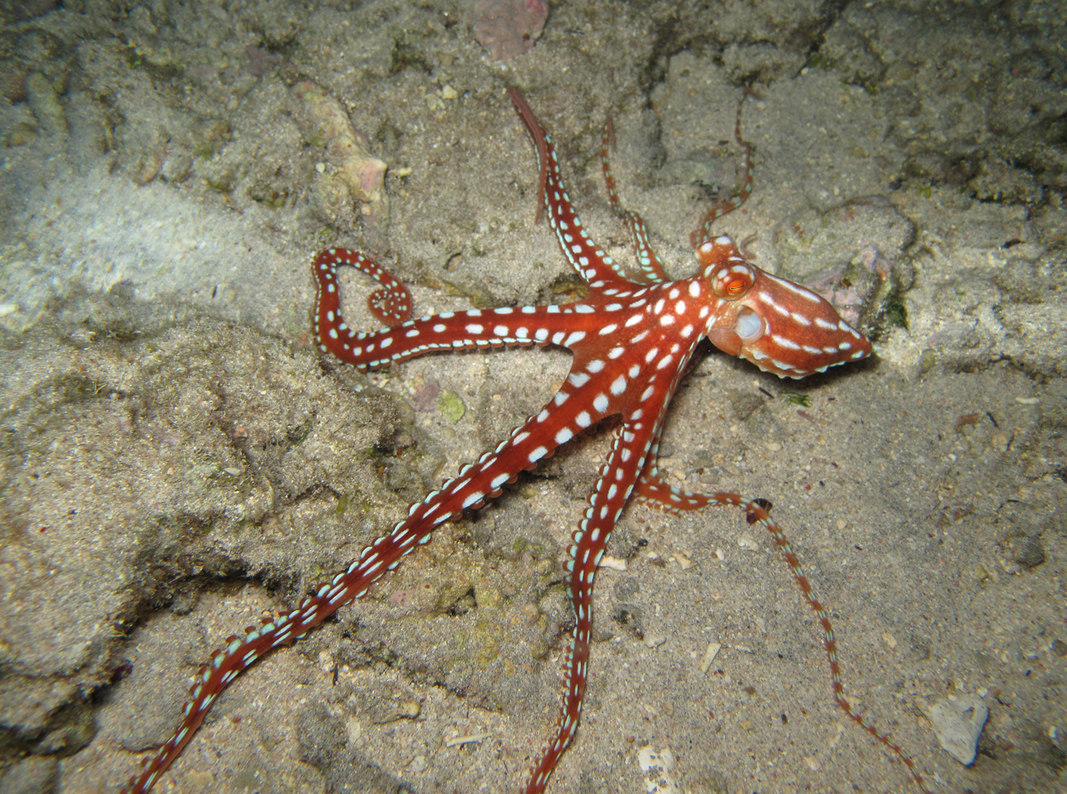 Le poulpe tacheté (Callistoctopus ornatus ou macropus) dans sa livrée d'intimidation, à la Réunion.